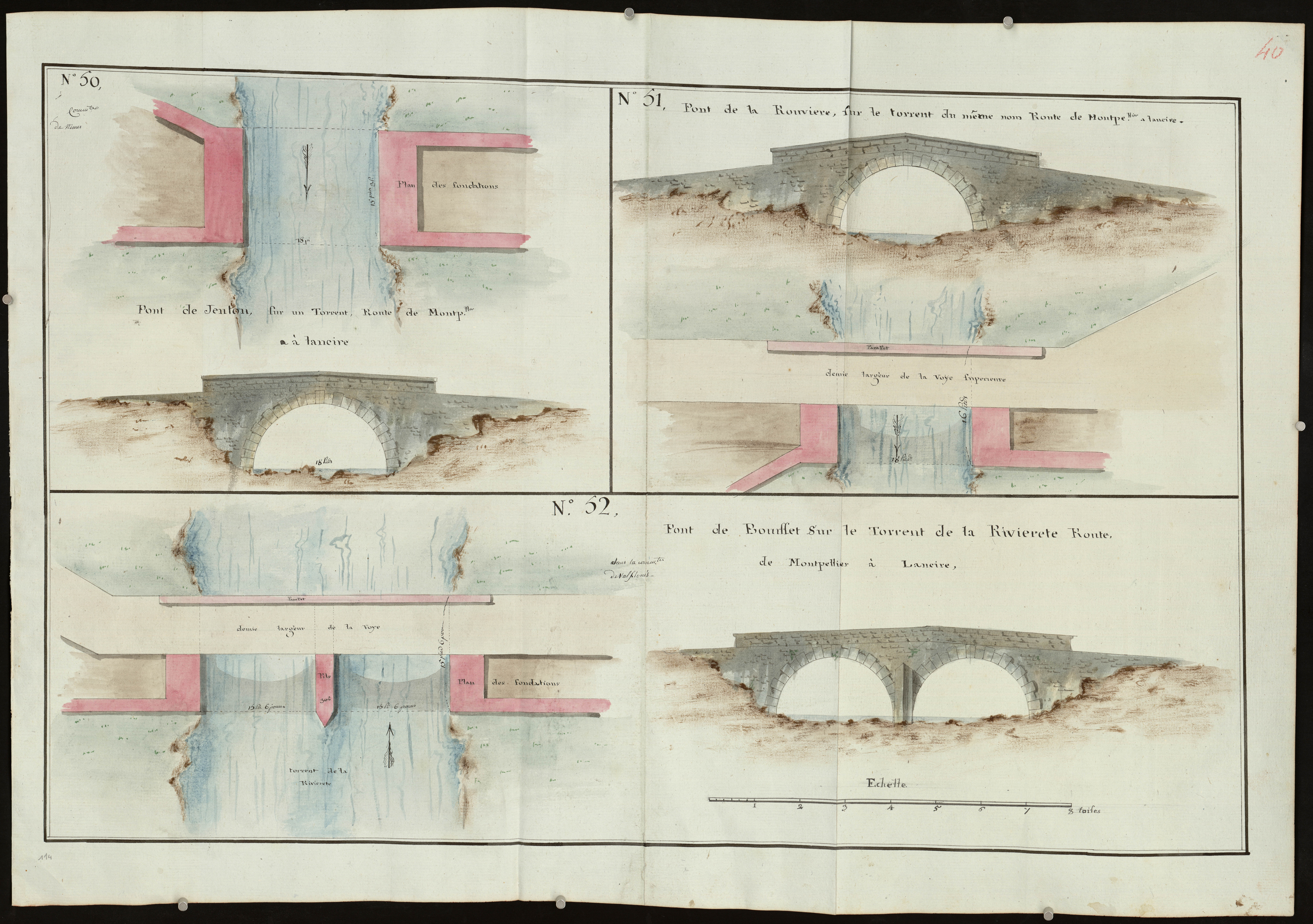 Valflaunès : plans, profils et élévations des ponts de Jenton, de la Rouvière et Bouisset.